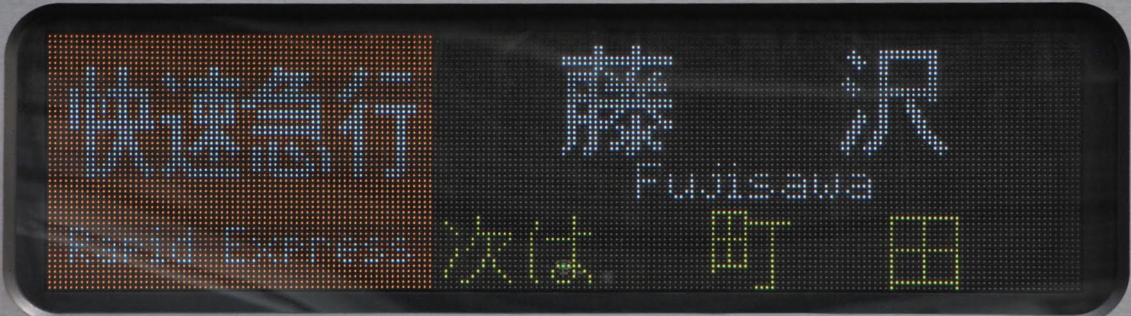 小田急5000形 LED方向幕(日本語)